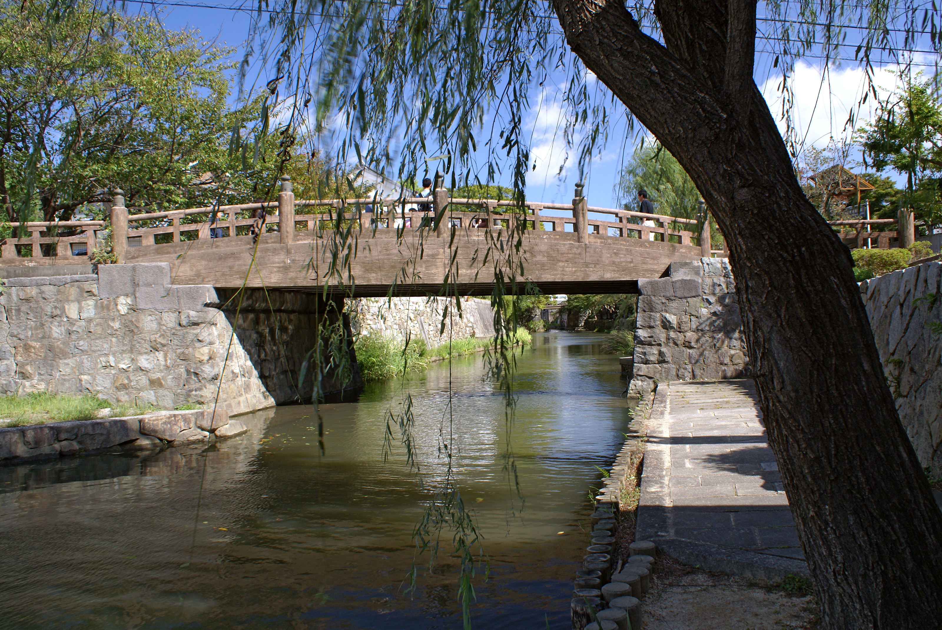 Hachimanbori in Omihachiman, Shiga, Japan